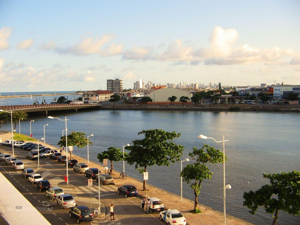 O Recife Antigo, visto do mirante do Paço Alfândega